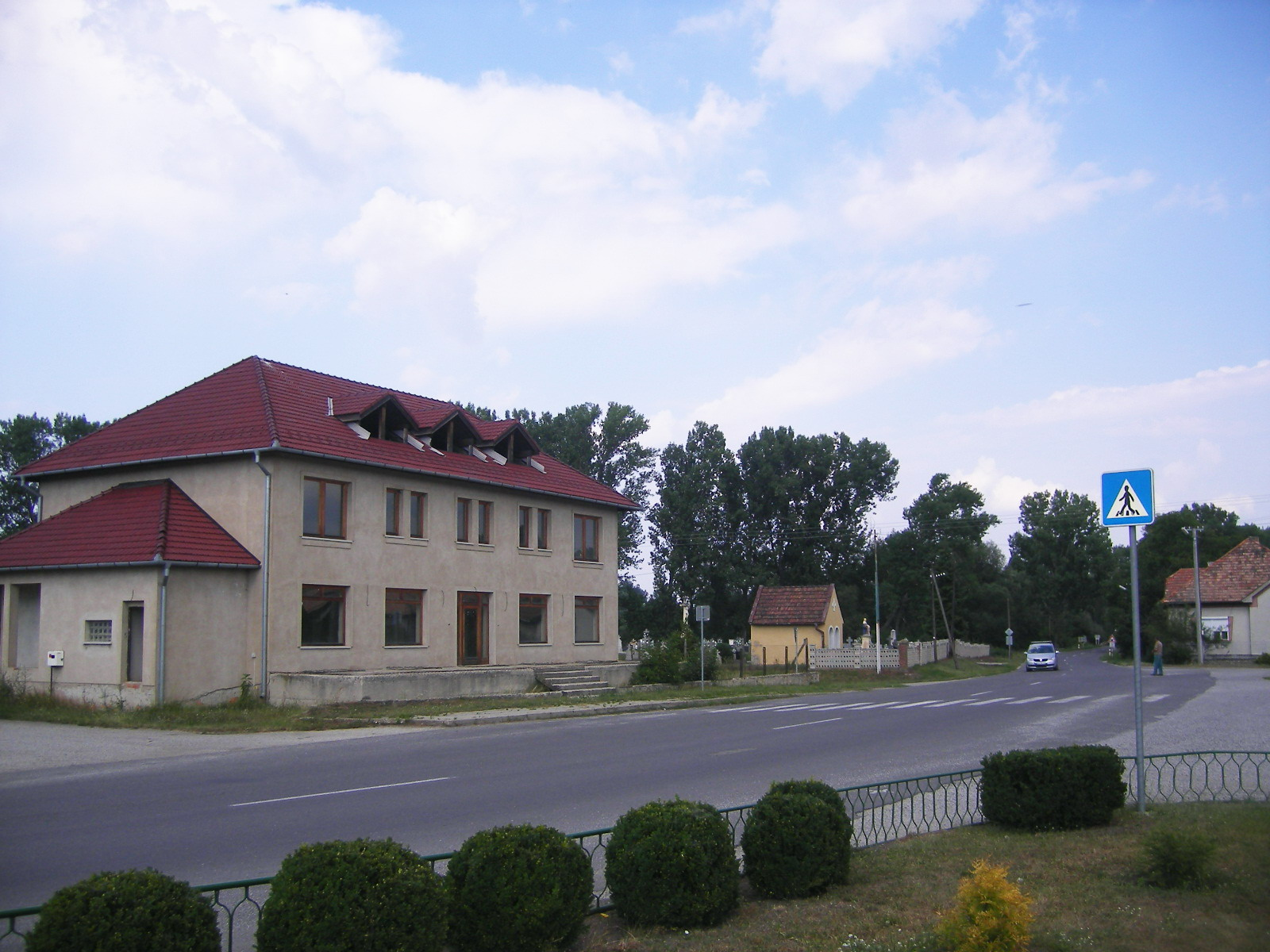 Ipolyhídvég - 527-es út